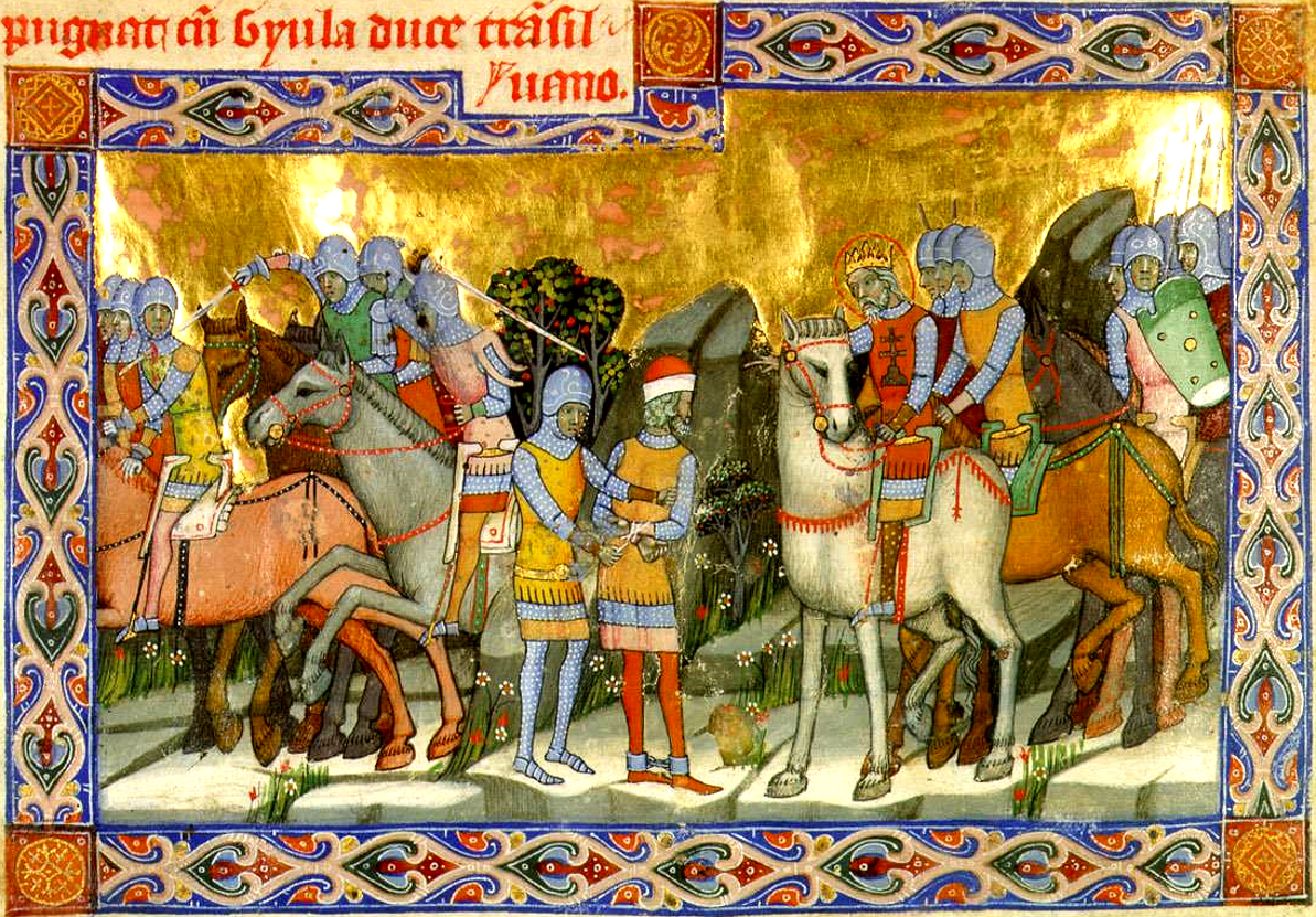 Képes krónika miniatúraAz írástükör egész szélességét elfoglaló miniatúra, díszes, stilizált növényi ornamentikás keretben: István király elfogja a pogány Gyula vezért. Sziklás-erdős hegyvidéken jobbról fehér lovon István király, mellén a kettőskeresztes címerrel, fején királyi koronával, glóriával; intő és parancsoló mozdulattal mutat az elfogott, megbilincselt lábú Gyulára, akinek kezét egy lovag öszszekötözi. Balról magyar lovagok üldözik Gyula harcosait.